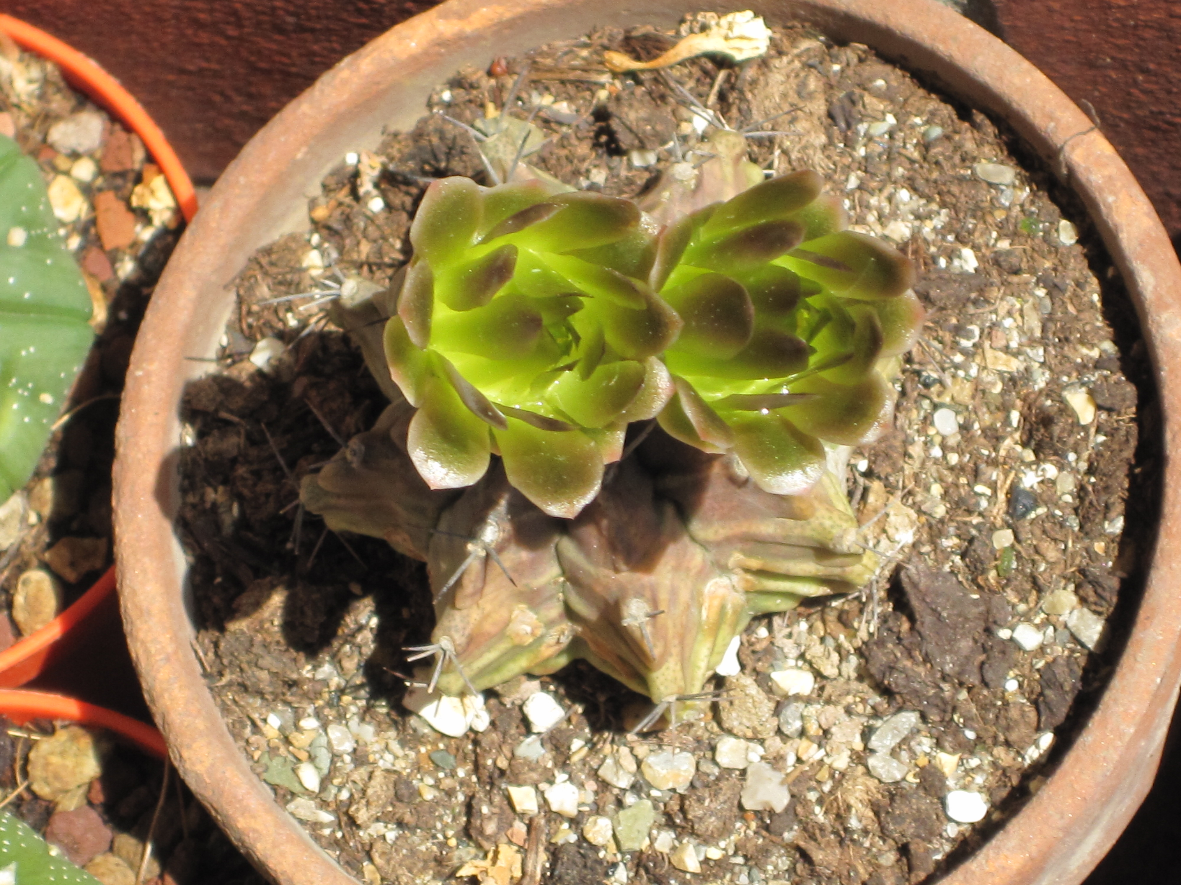 Gymnocalycium mihanovichii in fiore